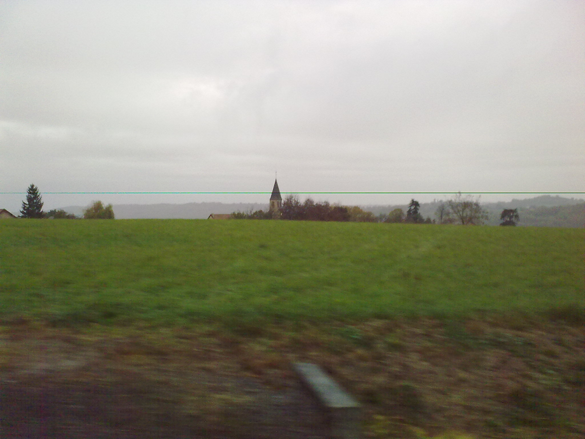 Saint-Jean-Poudge